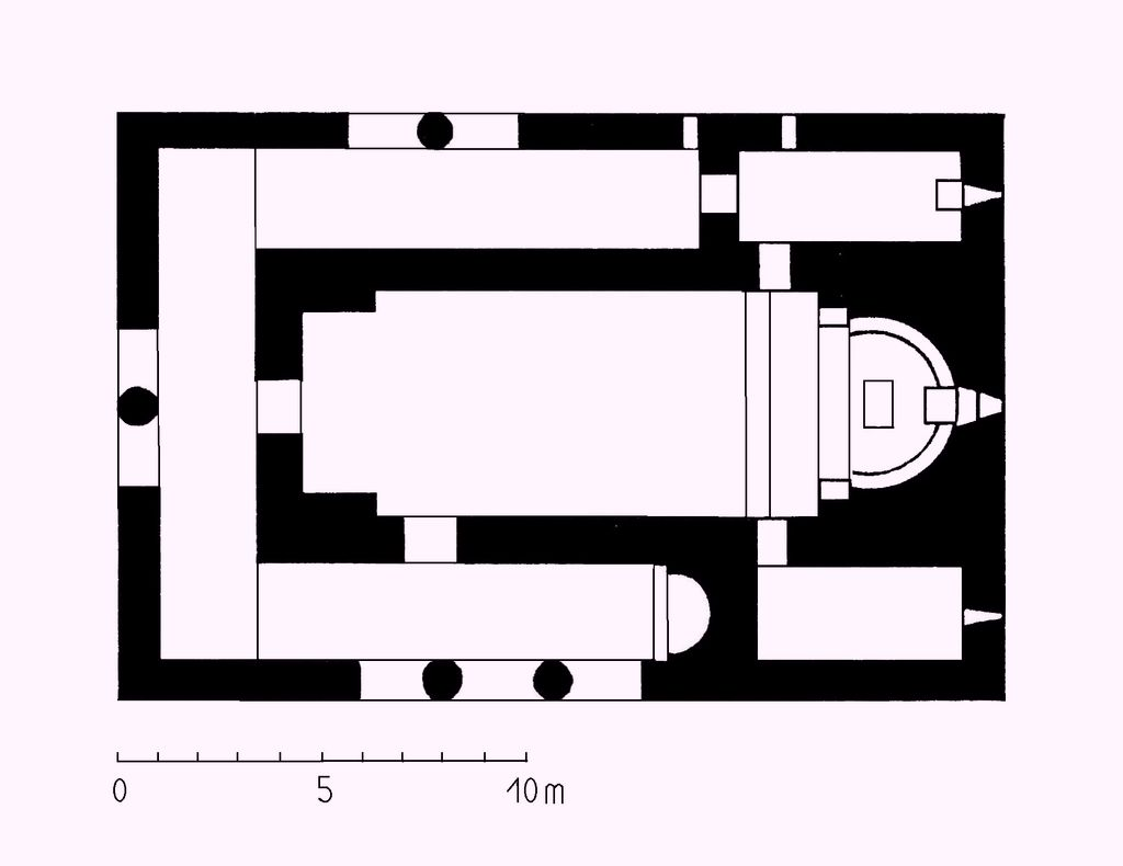 Zegani, three church basilika in Kakheti, ground plan from E. Neubauer: Altgeorgische Baukunst, 1976, p. 28